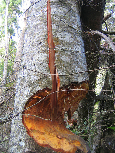 Beaver tree cut